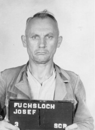 Haftbogenfoto des Angeklagten Joseph Fuchsloch (19.03.1896 - 1973), SS-Oberscharführer, stellvertretender Lagerführer des Außenlagers Harzungen des Konzentrationslagers Mittelbau-Dora, im Dachauer Dora-Prozess ("Case No. 000-50-37 Dora") am 30.12.1947 freigesprochen.